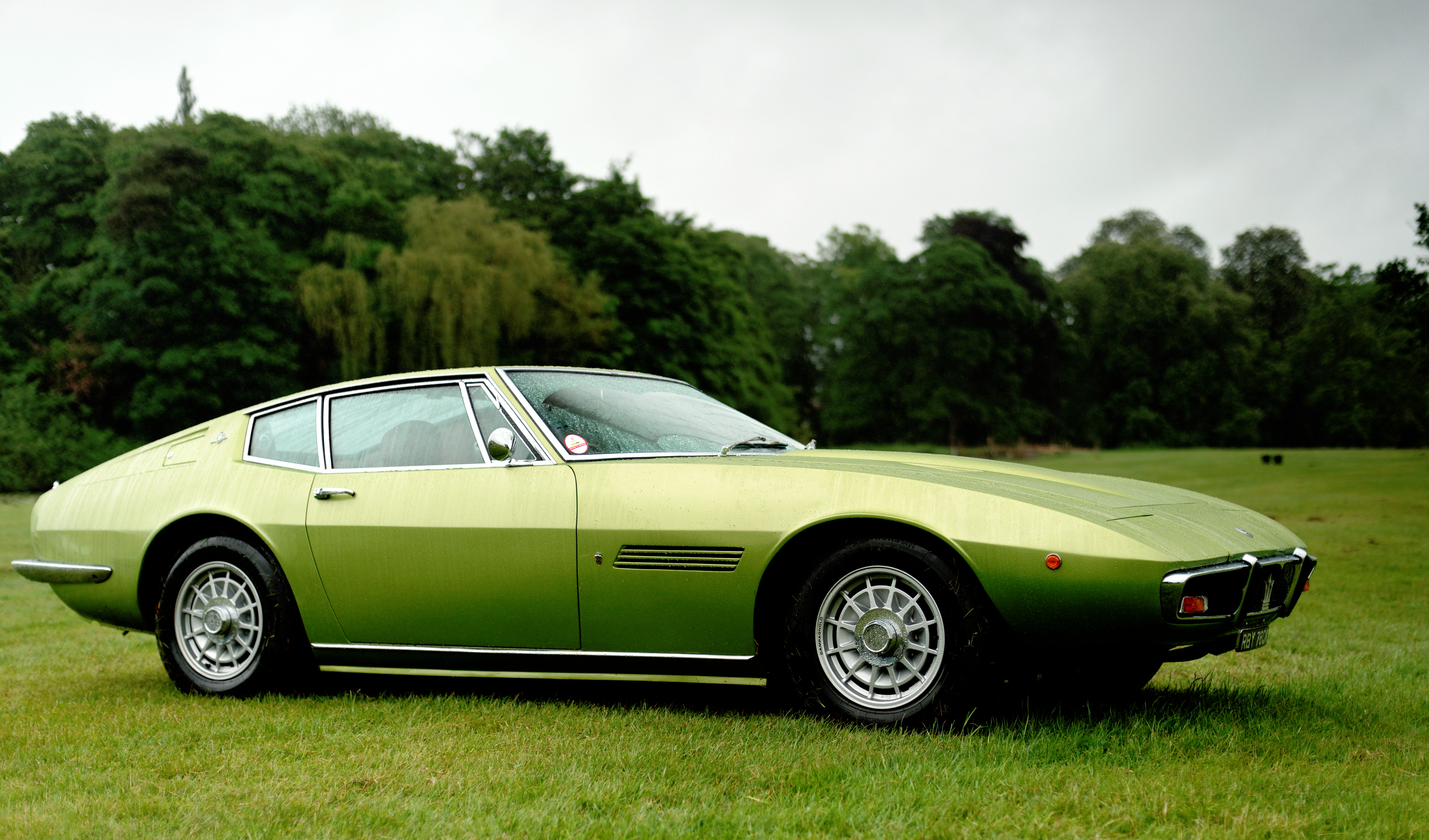 Maserati Ghibli Auto Italia Concours 2012